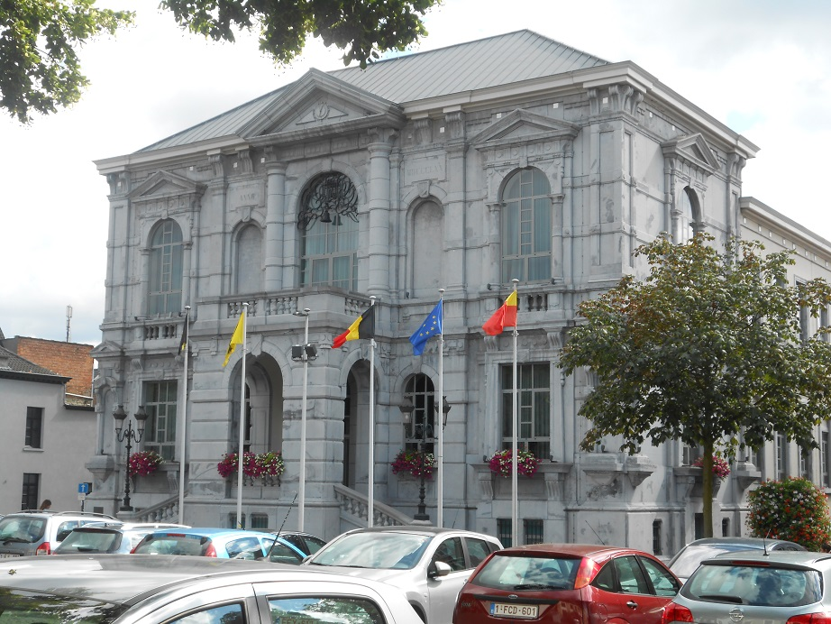 Vilvoorde, alcaldía